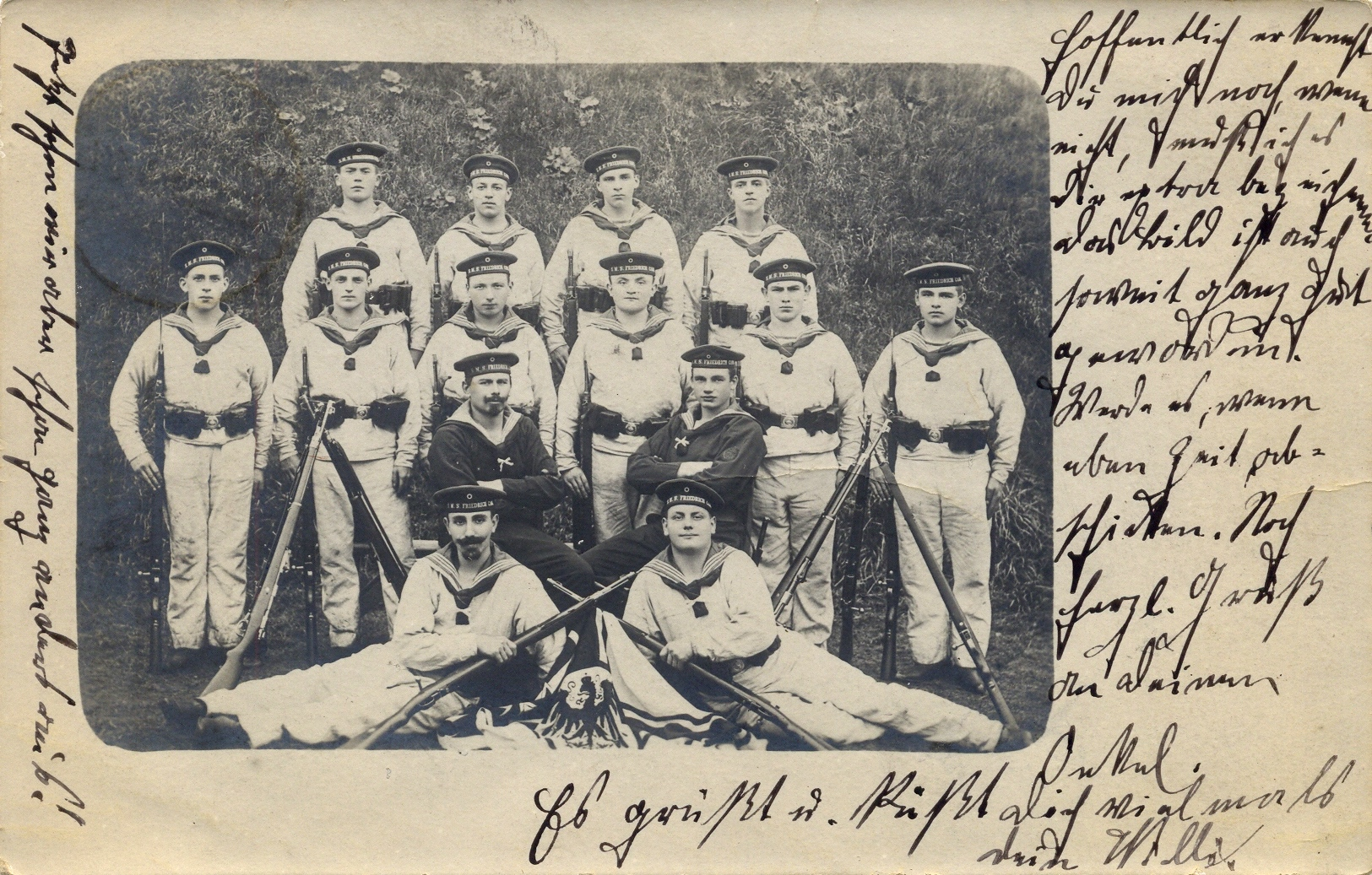 Моряки с броненосного крейсера Германской Империи «Фридрих Карл» «SMS Friedrich Carl».